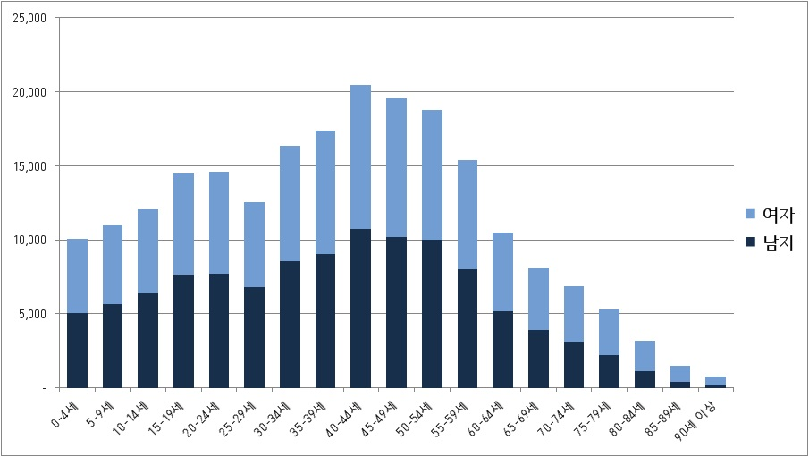 조선말: 용인시 처인구 연령별 인구구조 (2015년)